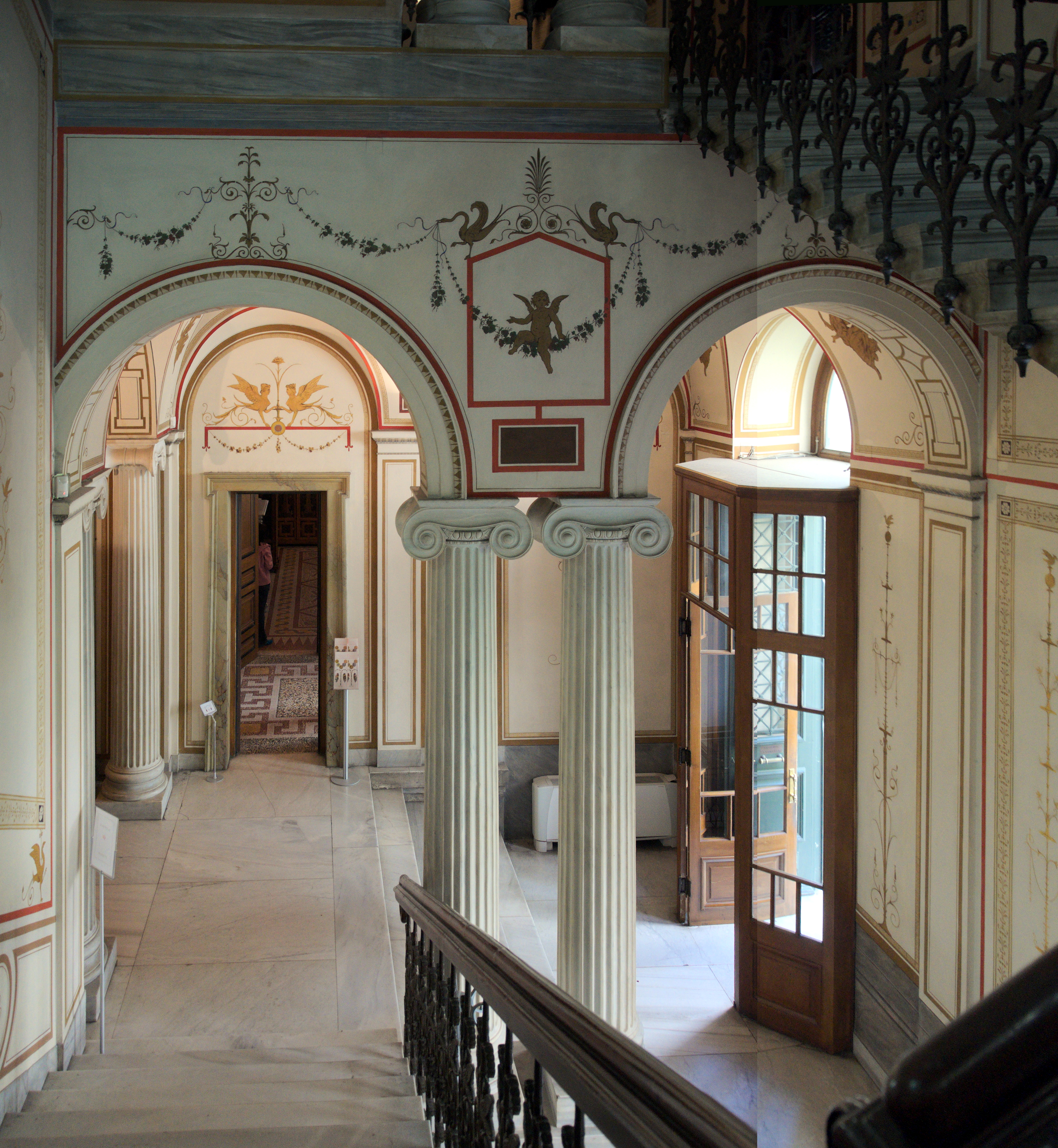 Ιλίου Μέλαθρον, κατοικία Ερ. Σλήμαν, εσωτερική κλίμακα και προθάλαμος«Ιλίου Μέλαθρον, κατοικία Ερ. Σλήμαν»